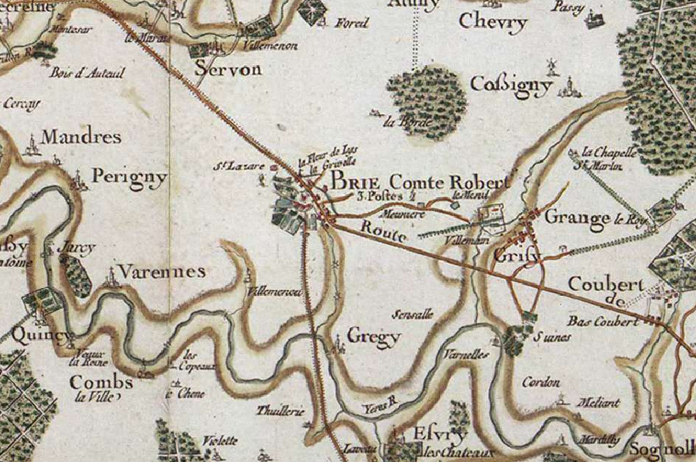 Carte de Brie-Comte-Robert au XV siècle